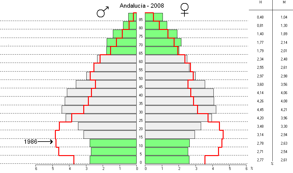 Pirámide de población de Andalucía en 2008, comprada con la del 1986